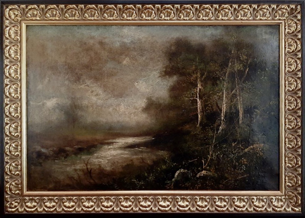 Paisaje con río